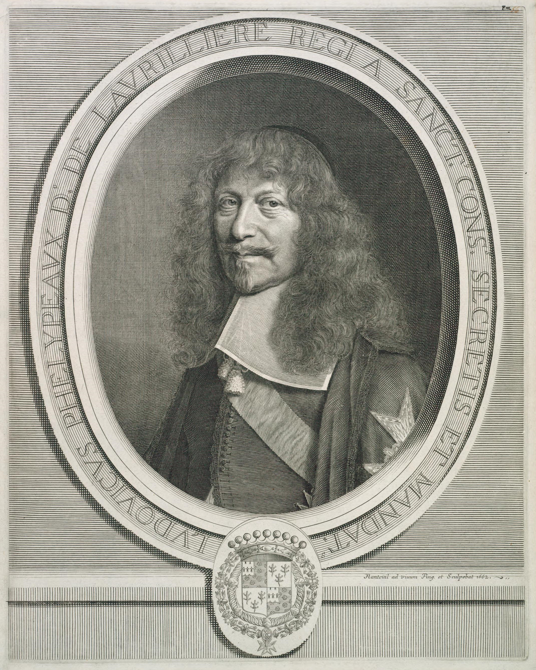 Porträt Louis' Phélypeaux de La Vrillière(1599-1681)